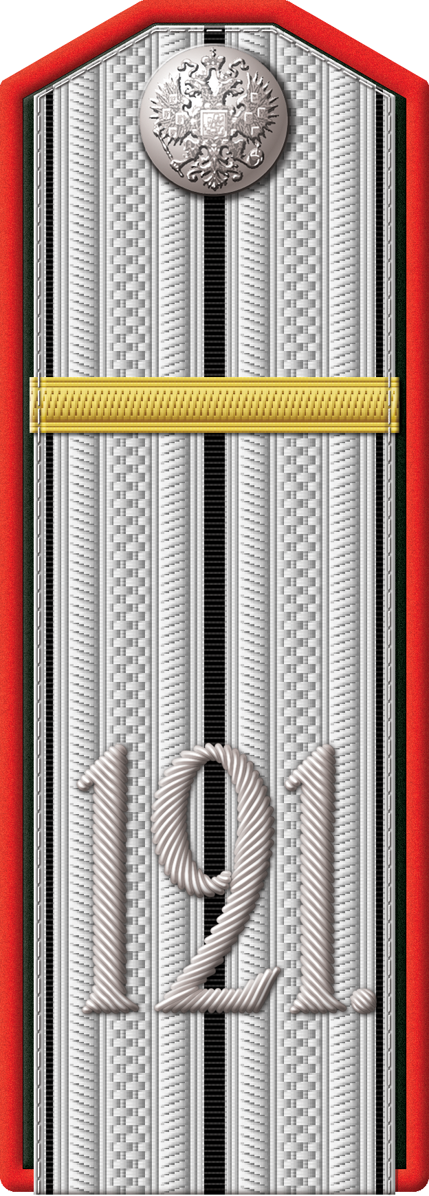 Погон: зауряд-военный врач 121-го пехотного Пензенского полка, 1914–1917 гг.